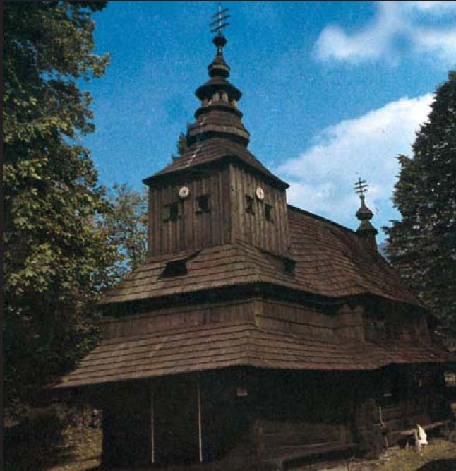 Drvena crkva Rusina